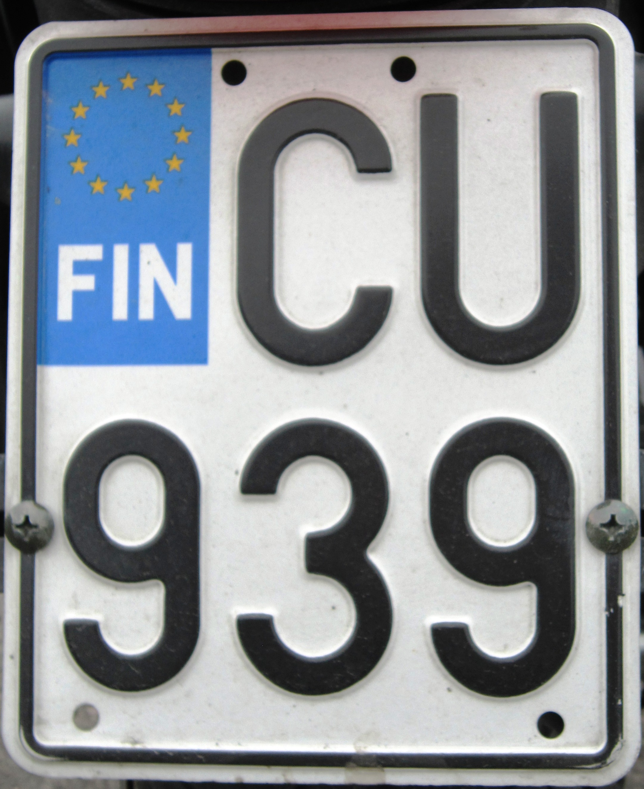 Finland kenteken motorfiets EU